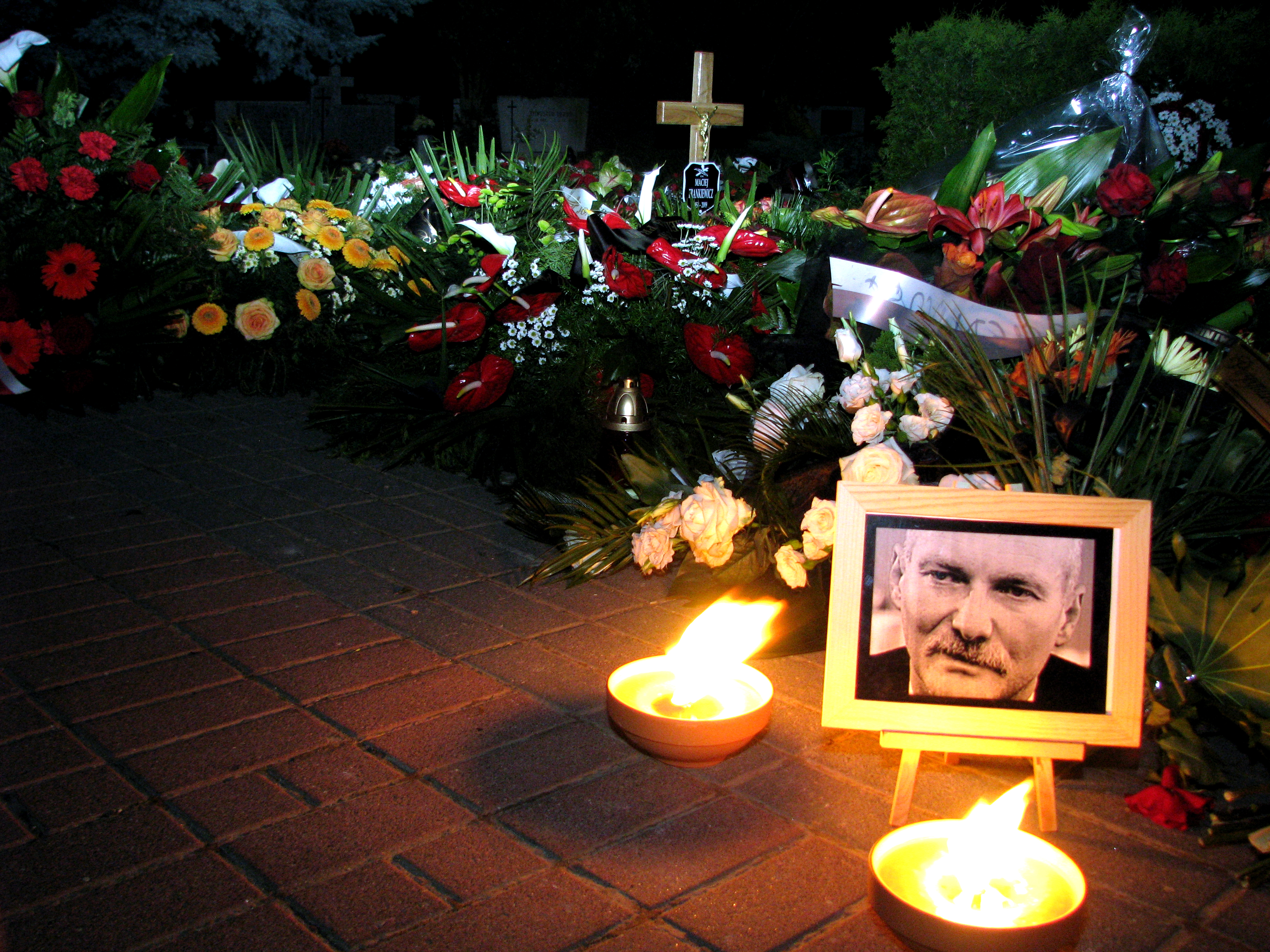 Wiązanki kwiatów przed grobem Macieja Frankiewicza (vice prezydenta miasta Poznania) w dniu pogrzebu 2009-06-19